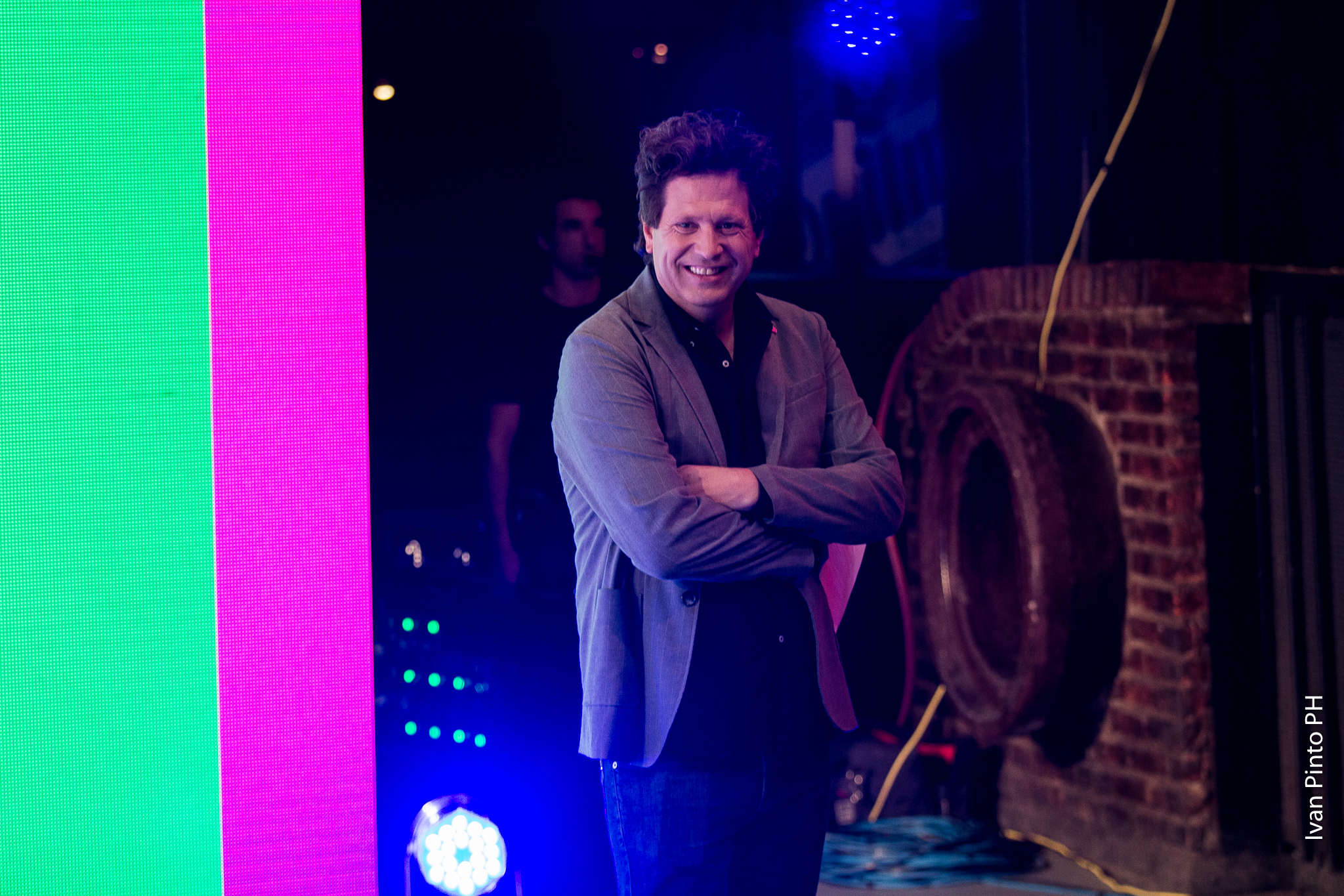 Bebe Contepomi grabando el programa Rock del País